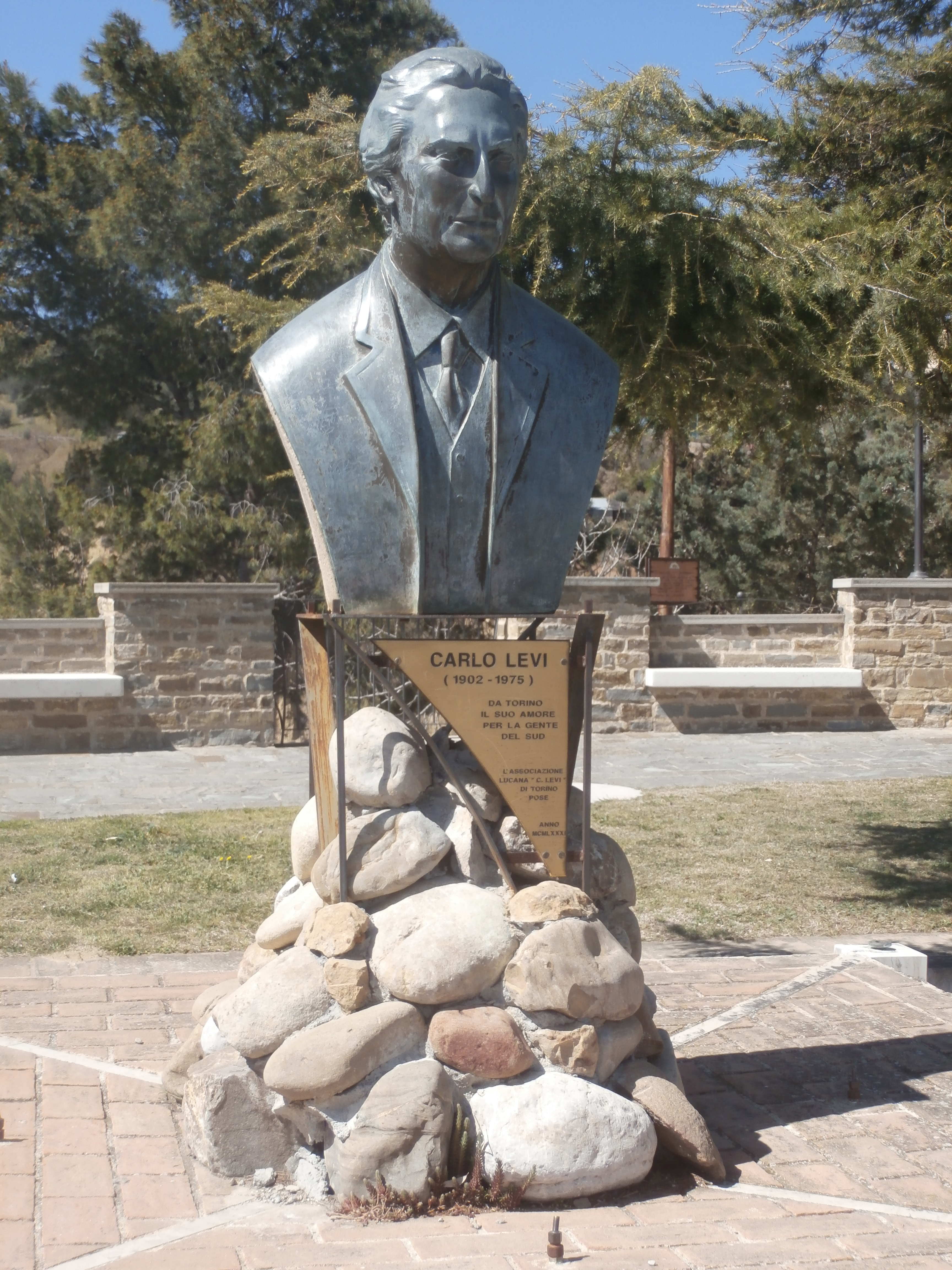 busto di Levi